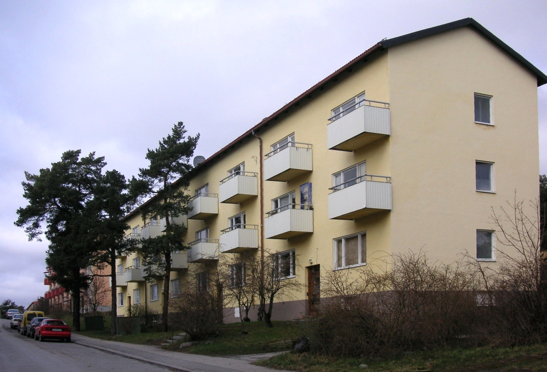 Traneberg, Kinnekullevägen, Stockholm